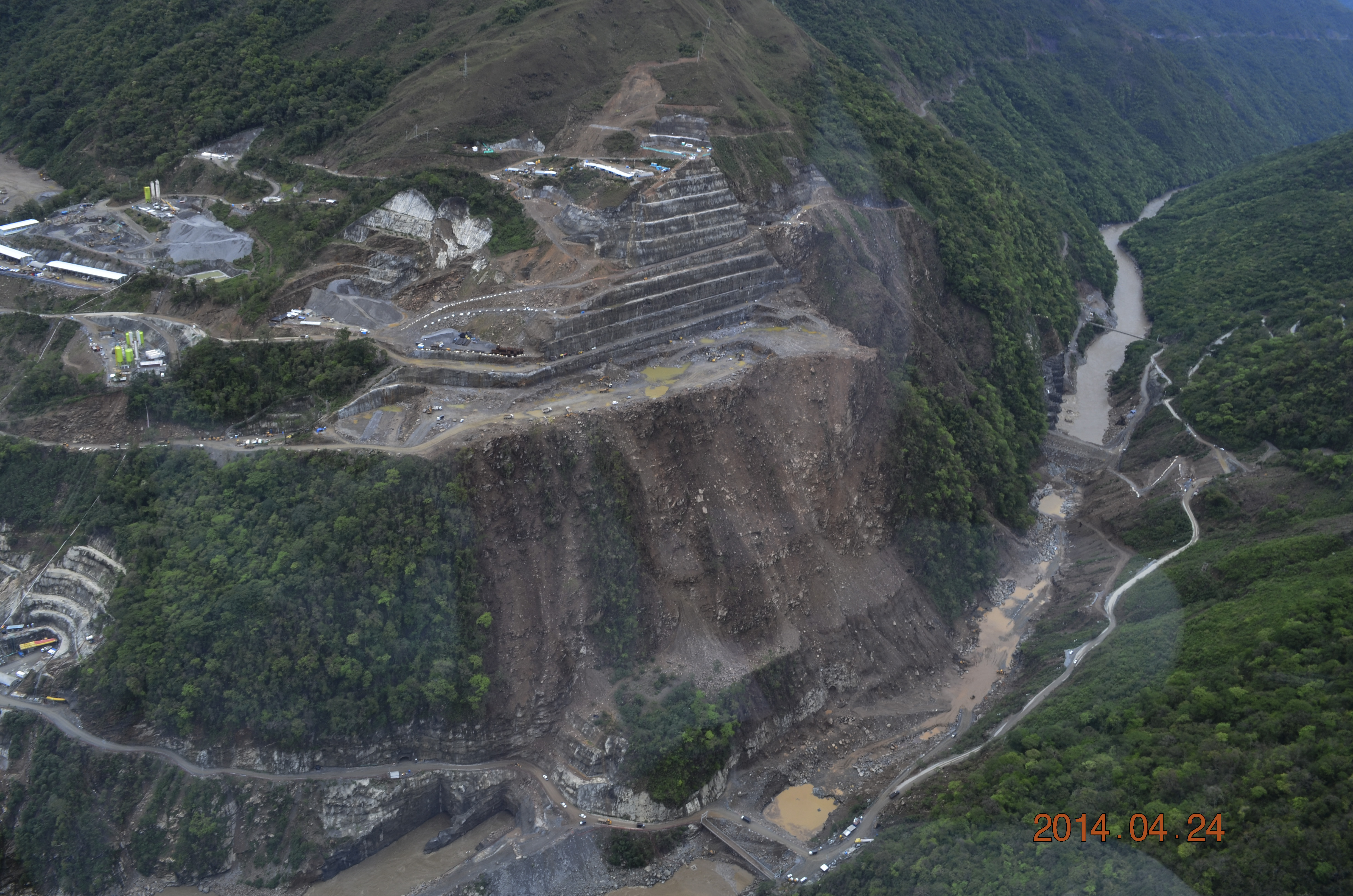 Fotografía aerea del proceso de construcción de la Central Hidroeléctrica Ituango